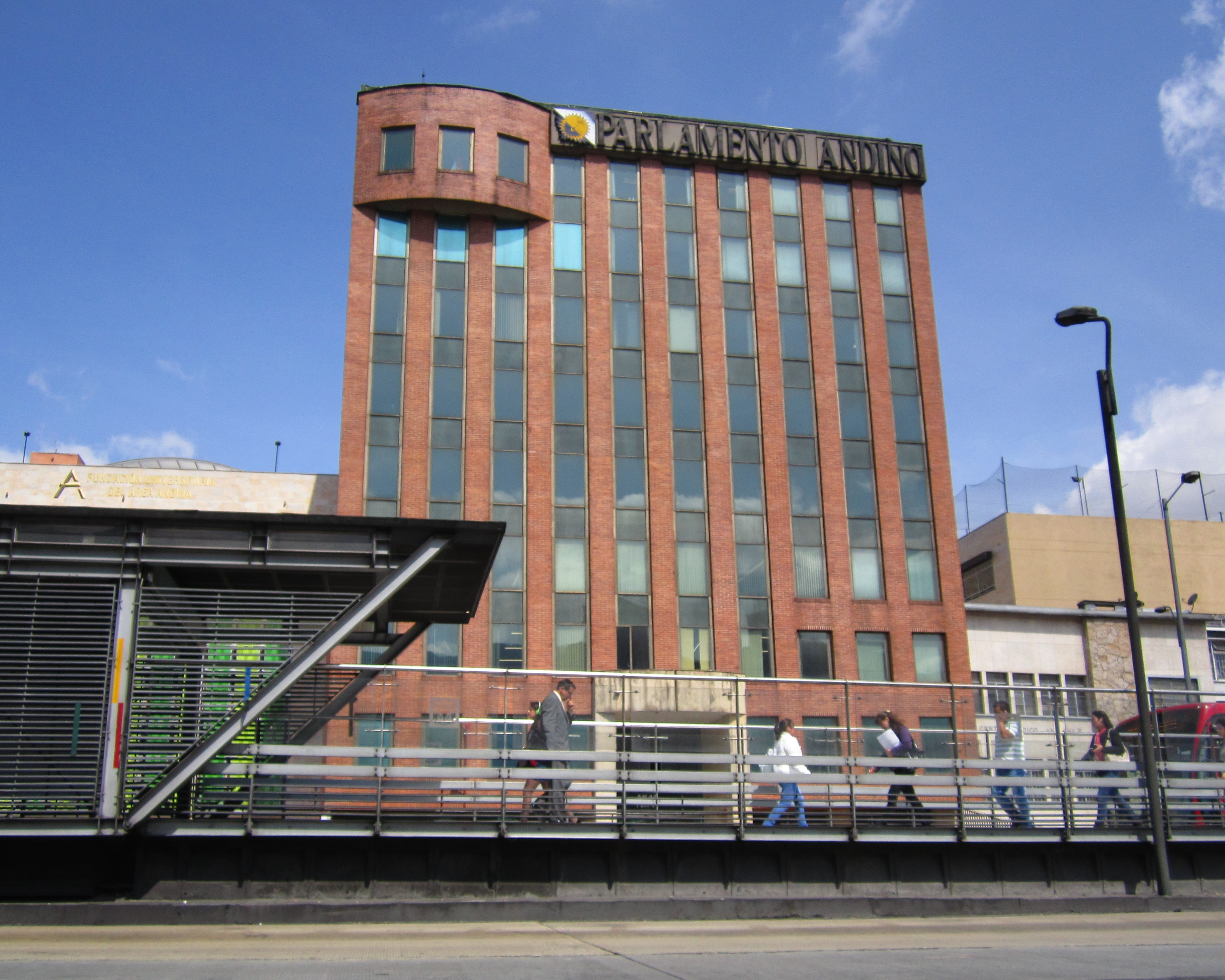 Parlamento Andino, avenida Caracas Bogotá.